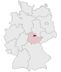 Landkreis Sömmerda, Thuringia, Germany